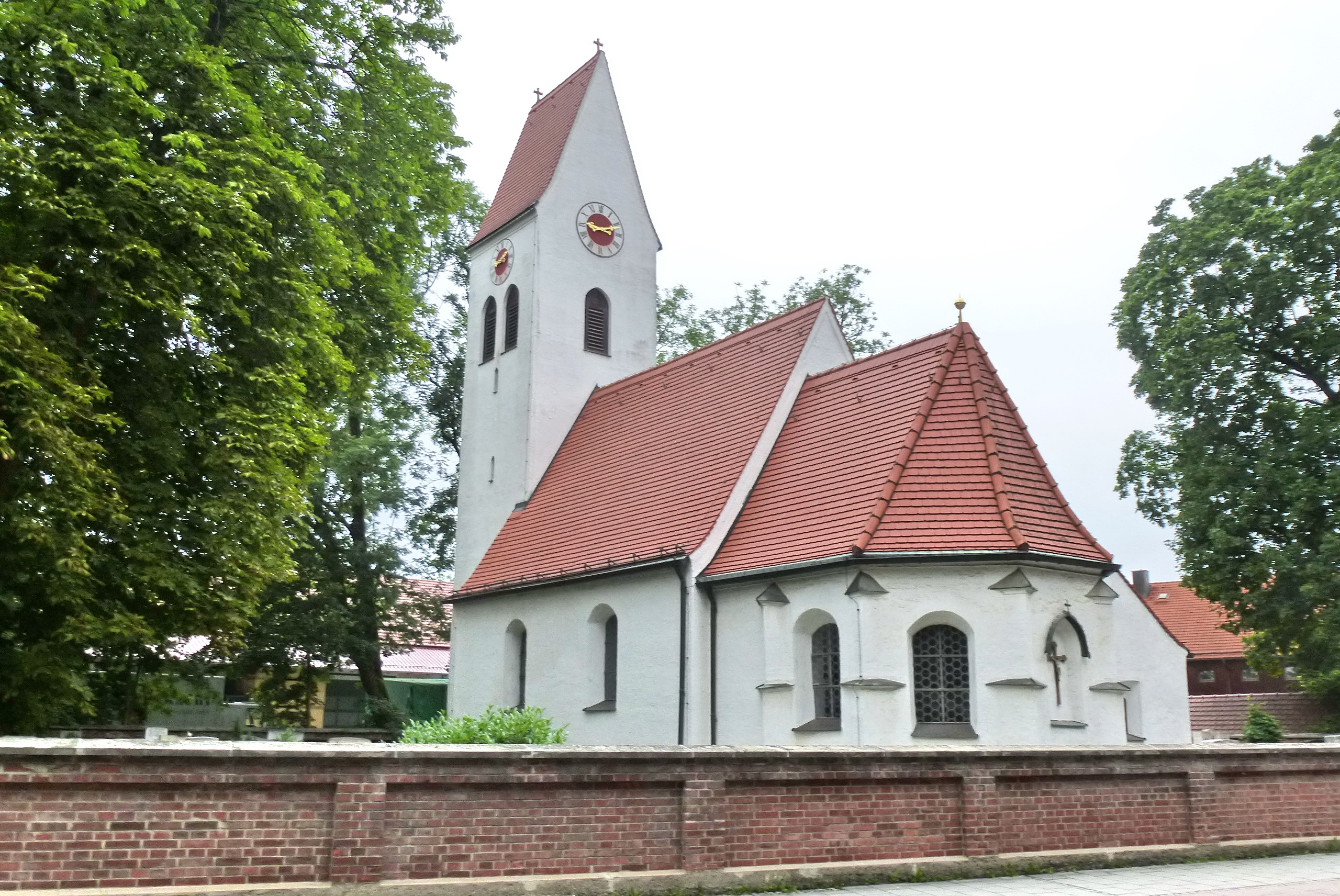 Dornach bei München, katholische Kirche St.Margareta